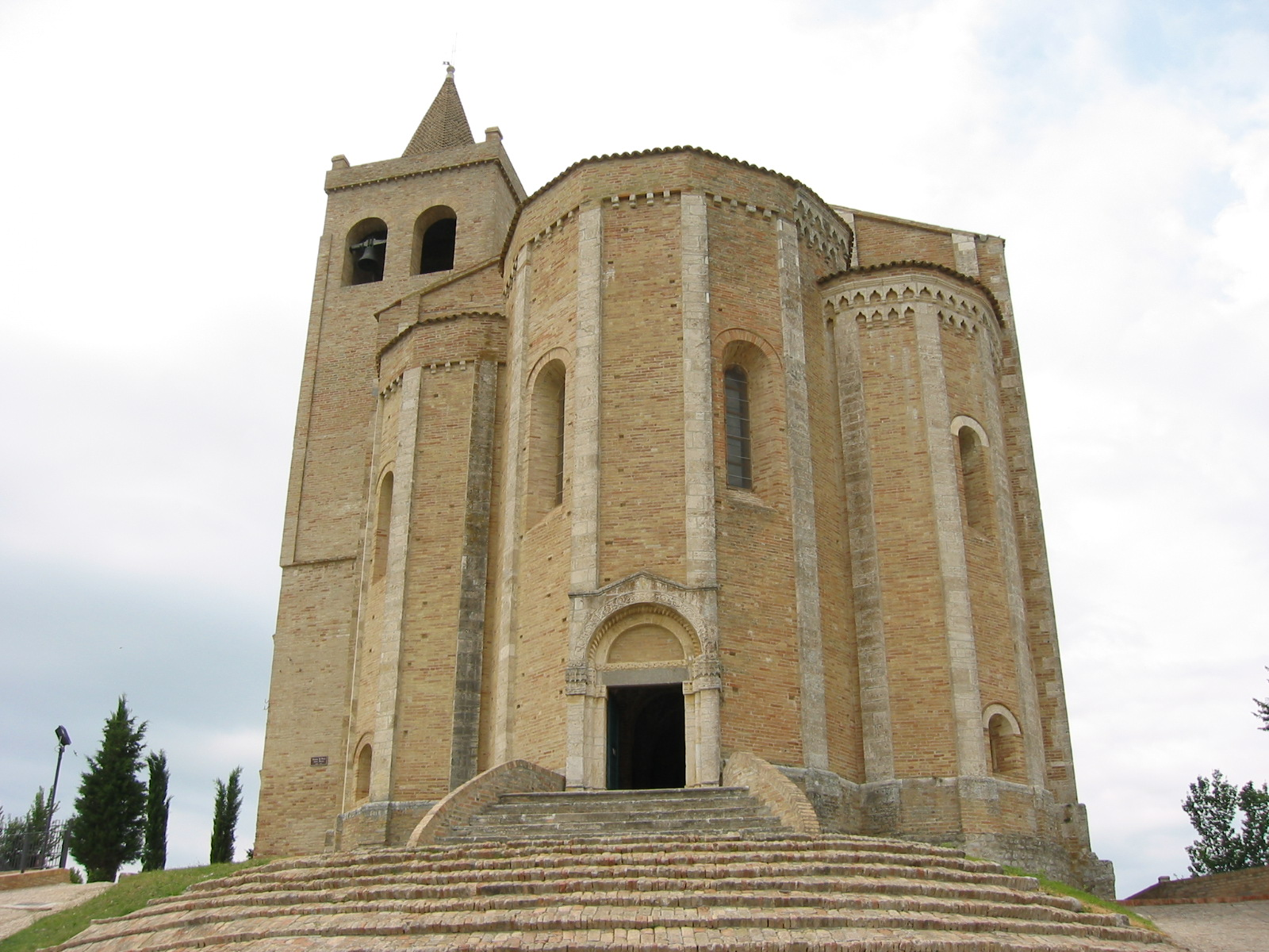 Offida, Marche, ItaliaSanta Maria della Rocca